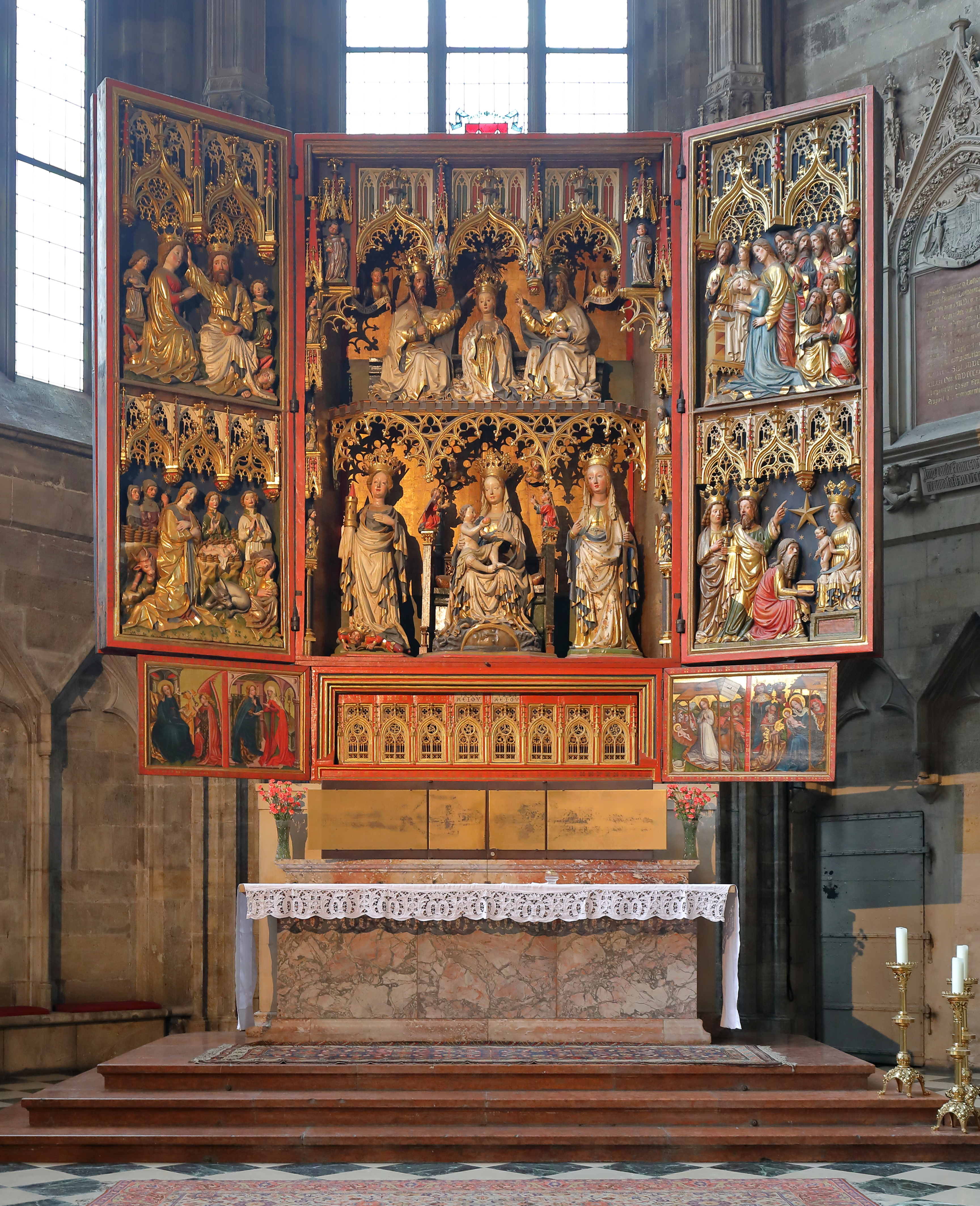 Festtagsseite des Wiener Neustädter Altars im Chor des linken Seitenschiffes des Stephansdoms in der österreichischen Bundeshauptstadt Wien.Der gotische Flügelaltar wurde von König Friedrich IV. (ab 1452 Kaiser Friedrich III.) gestiftet. Ursprünglich war er wahrscheinlich für das Zisterzienserkloster Viktring (Kärnten) bestimmt, jedoch 1447 wurde er in der Kirche des 1444 gegründeten Zisterzienserklosters Neukloster in Wiener Neustadt als Hochaltar aufgestellt. Nachdem dort 1698/1699 ein barocker Hochaltar aufgestellt wurde, wurde der Flügelaltar hinter diesem im Chorraum aufgestellt. 1884 wurde er vom Wiener Dombauverein gekauft und 1885 im nördlichen Chor (Frauenchor) des Stephansdoms aufgestellt.